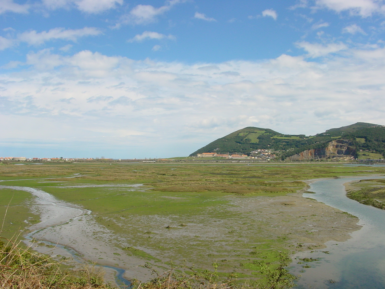 Marismas de Santoña (Cantabria. Al fondo a la derecha el monte de Santoña y a sus pies los edificios del penal del Dueso.